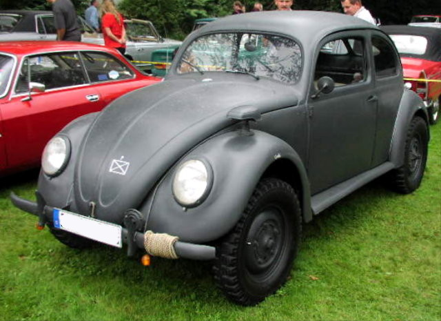 Volkswagen Käfer (Beetle) Type 82e